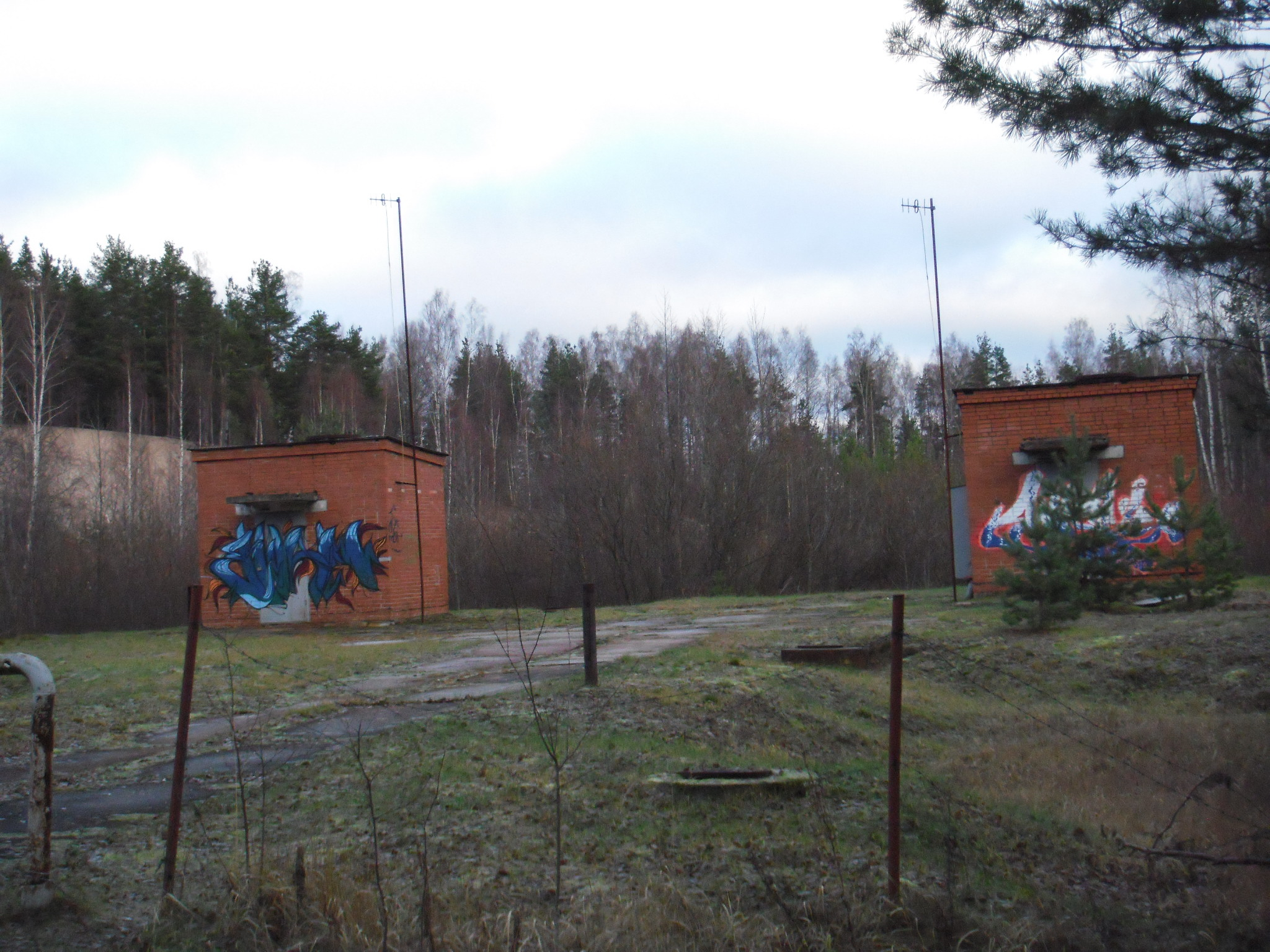 Сестрорецк на берегах "Ржавой канавы"